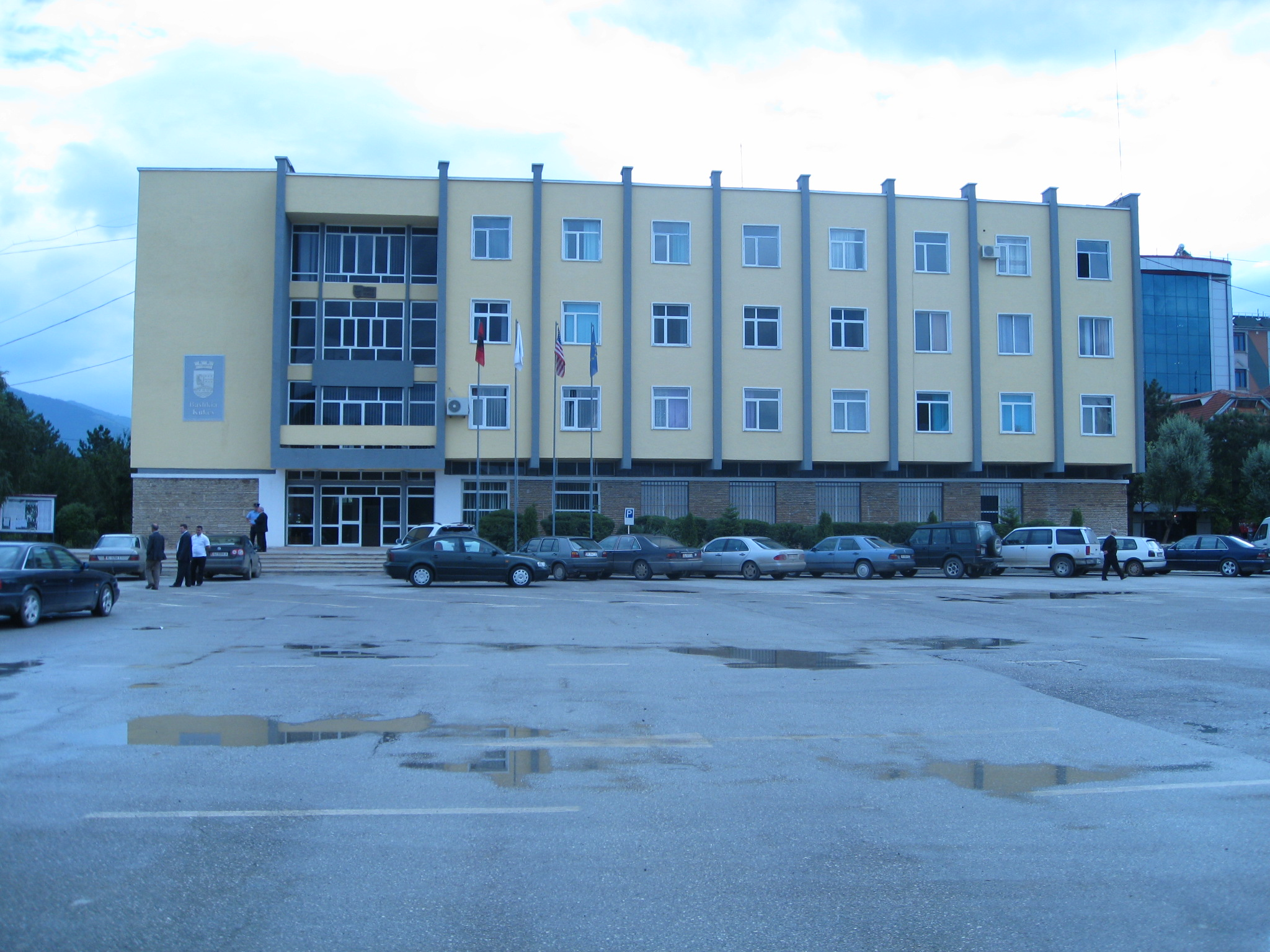 Kjo eshte godina e Institucioneve te Bashkise Kukes dhe Qarkut Kukes